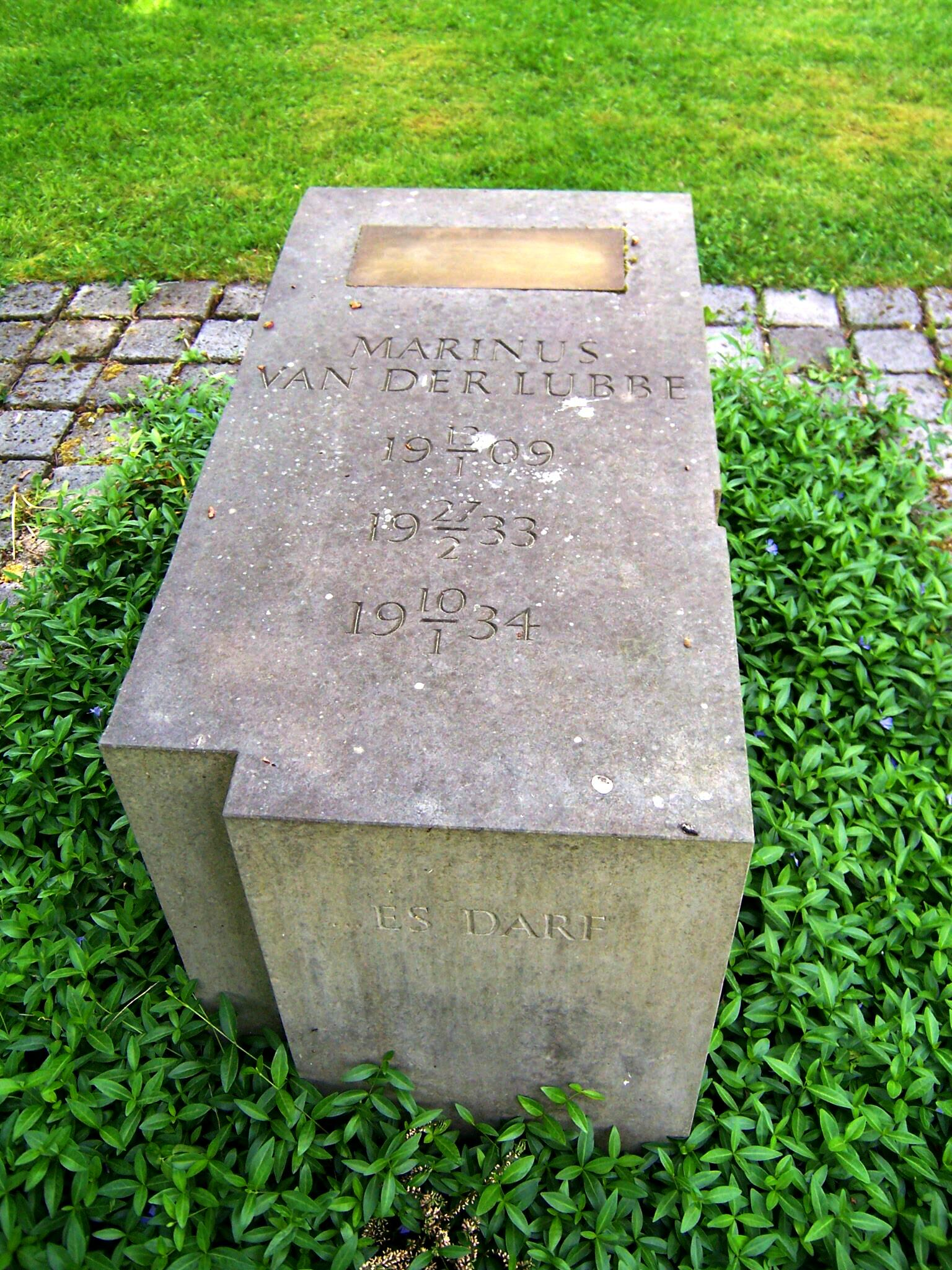 Gedenkstein für Marinus van der Lubbe auf dem Leipziger Südfriedhof. Der Stein wurde von den niederländischen Künstlern Ron Sluik und Reinier Kurpershoek gestaltet und am 13. Januar 1999 in Abteilung VIII des Leipziger Südfriedhofes aufgestellt. Auf ihm ist unter anderem ein Vers aus van der Lubbes Gedicht „Schönheit, Schönheit“ zu lesen.